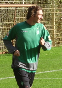 Christian Schulz / Trainingsanlagen am Weserstadion